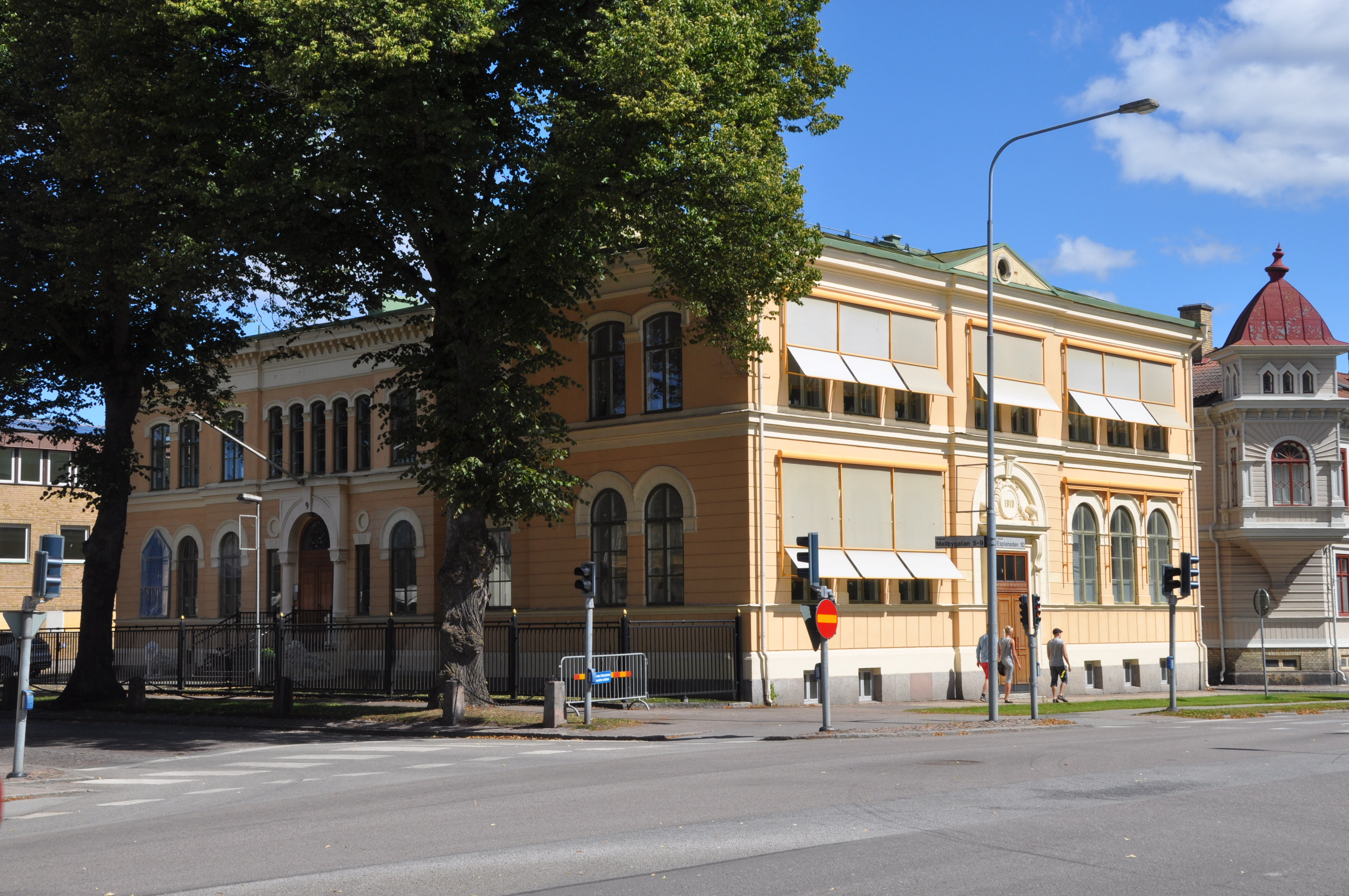 Gamla flickskolan, Lidköping. Arkitekt för tillbyggnaden mot Esplanaden 1910 var Emil Hagberg